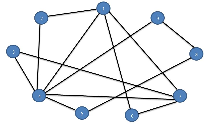 DoThiEuler_VdThuatToanFleury